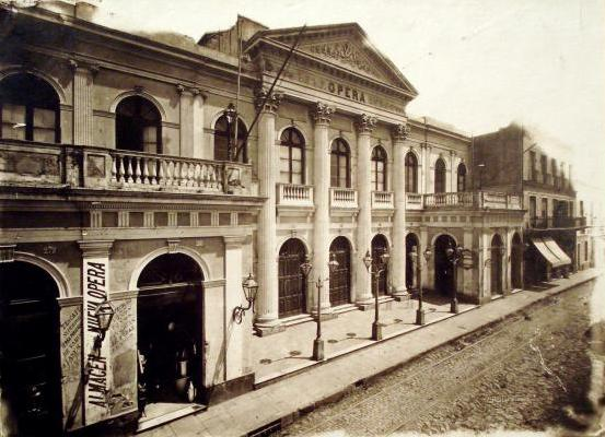 Fachada del primer Teatro Ópera de Buenos Aires, ubicado sobre la calle Corrientes entre Esmeralda y Suipacha, en el mismo terreno en donde se encuentra el actual edificio homónimo.